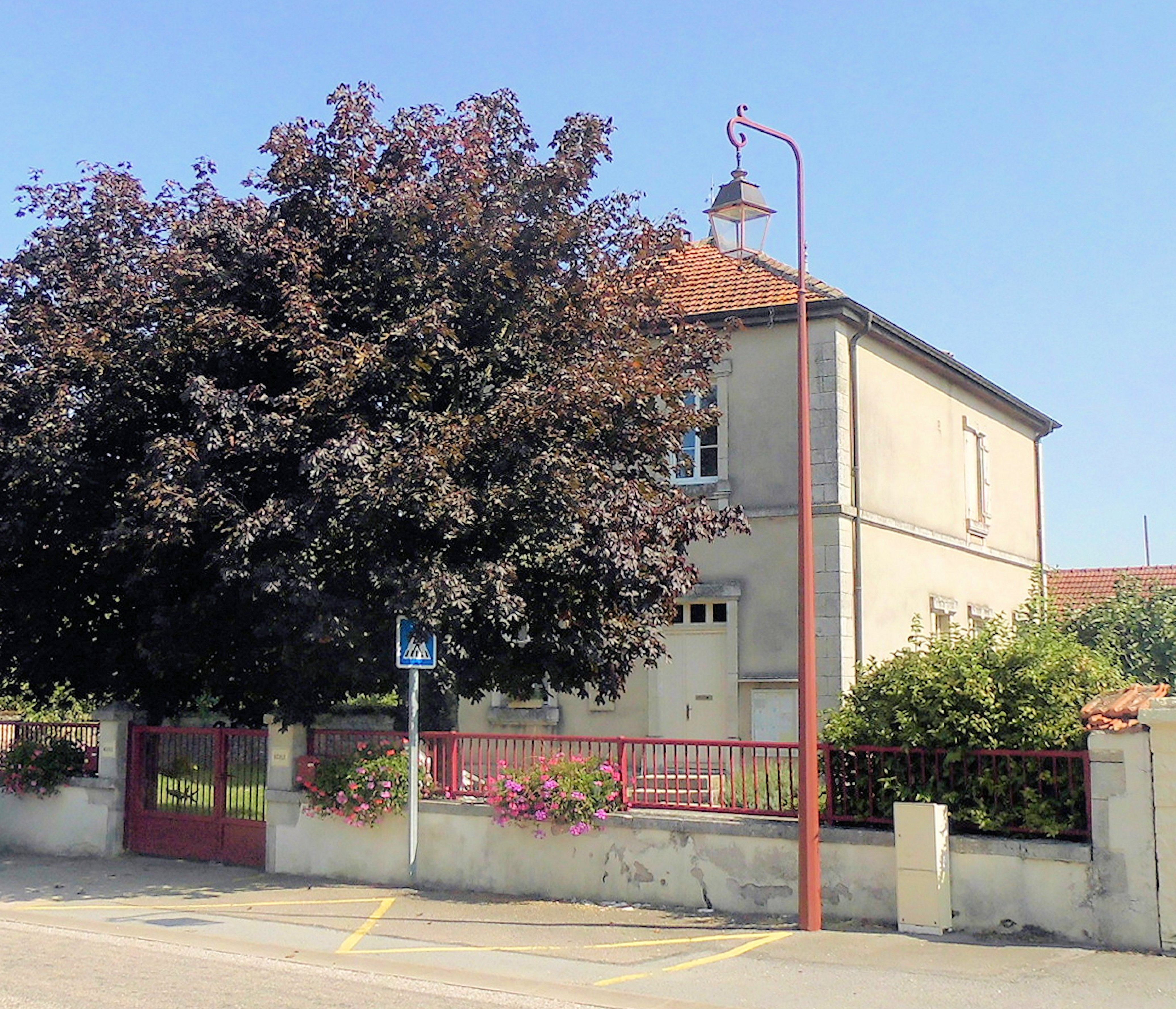 La mairie-école de Balléville